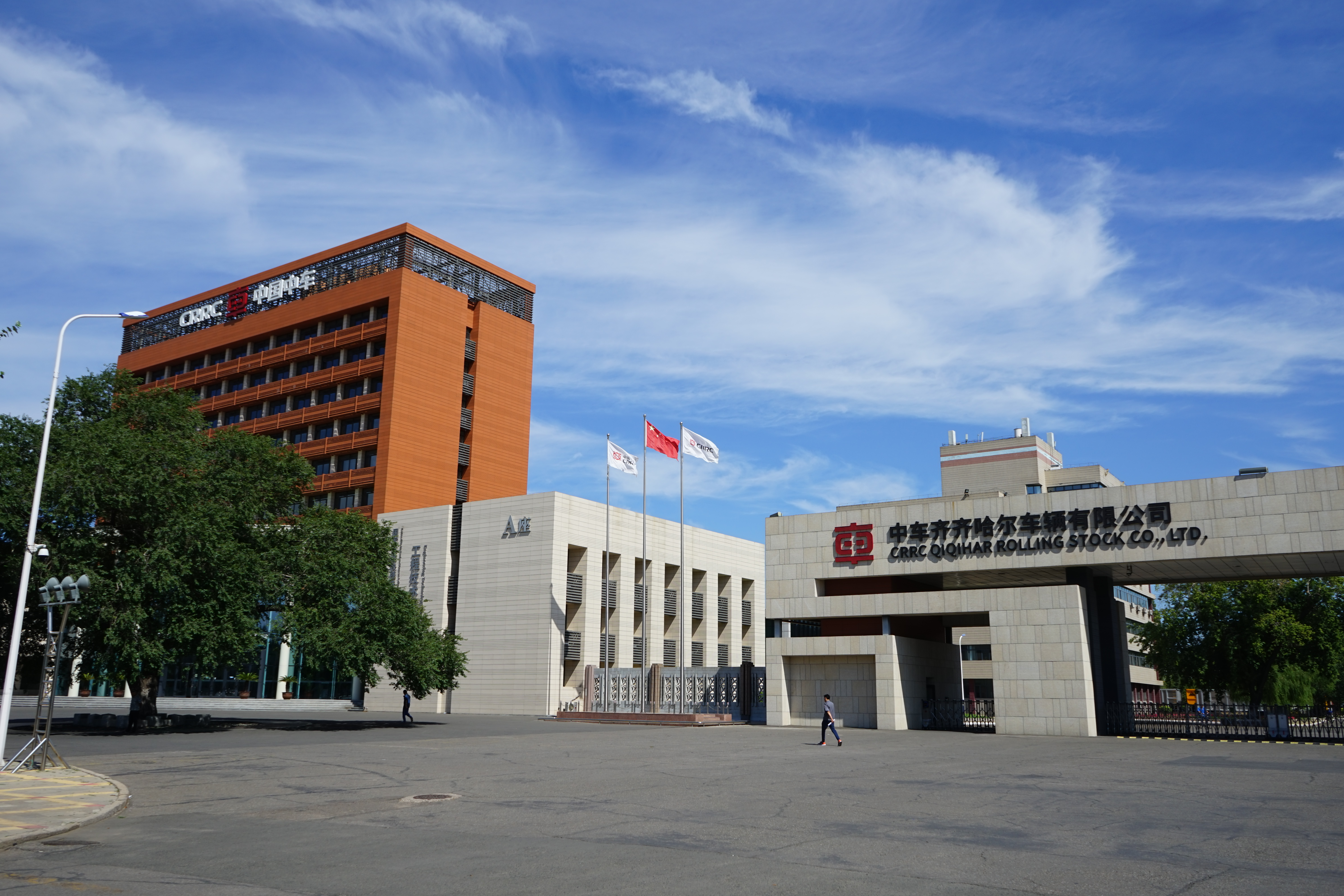 中车齐齐哈尔车辆有限公司大门